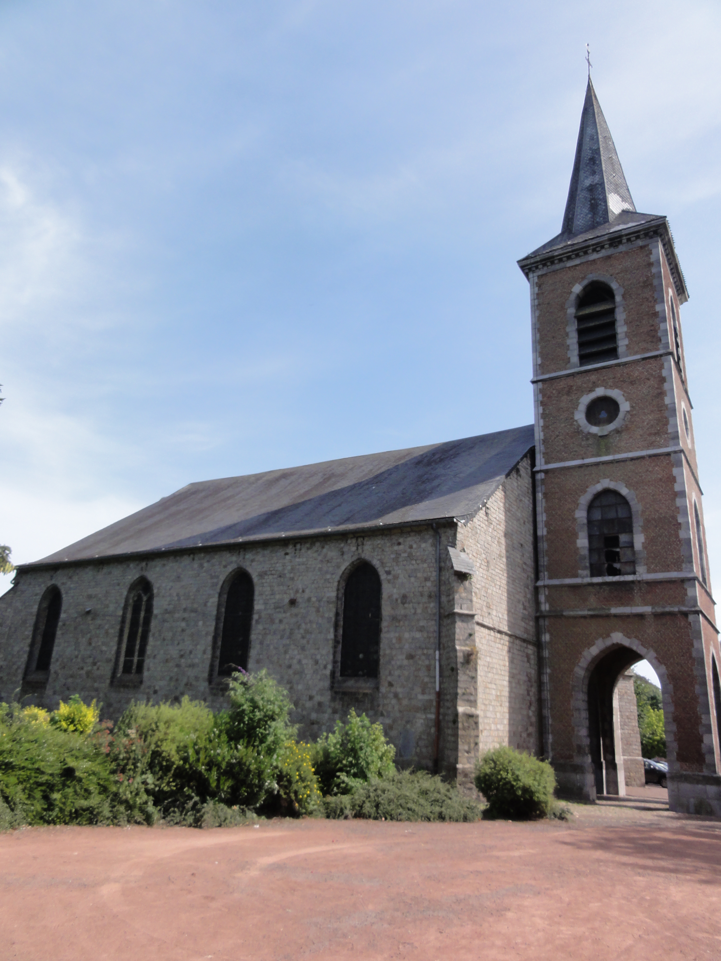 Gommegnies (Nord, Fr) église N.D. de l'Assomption